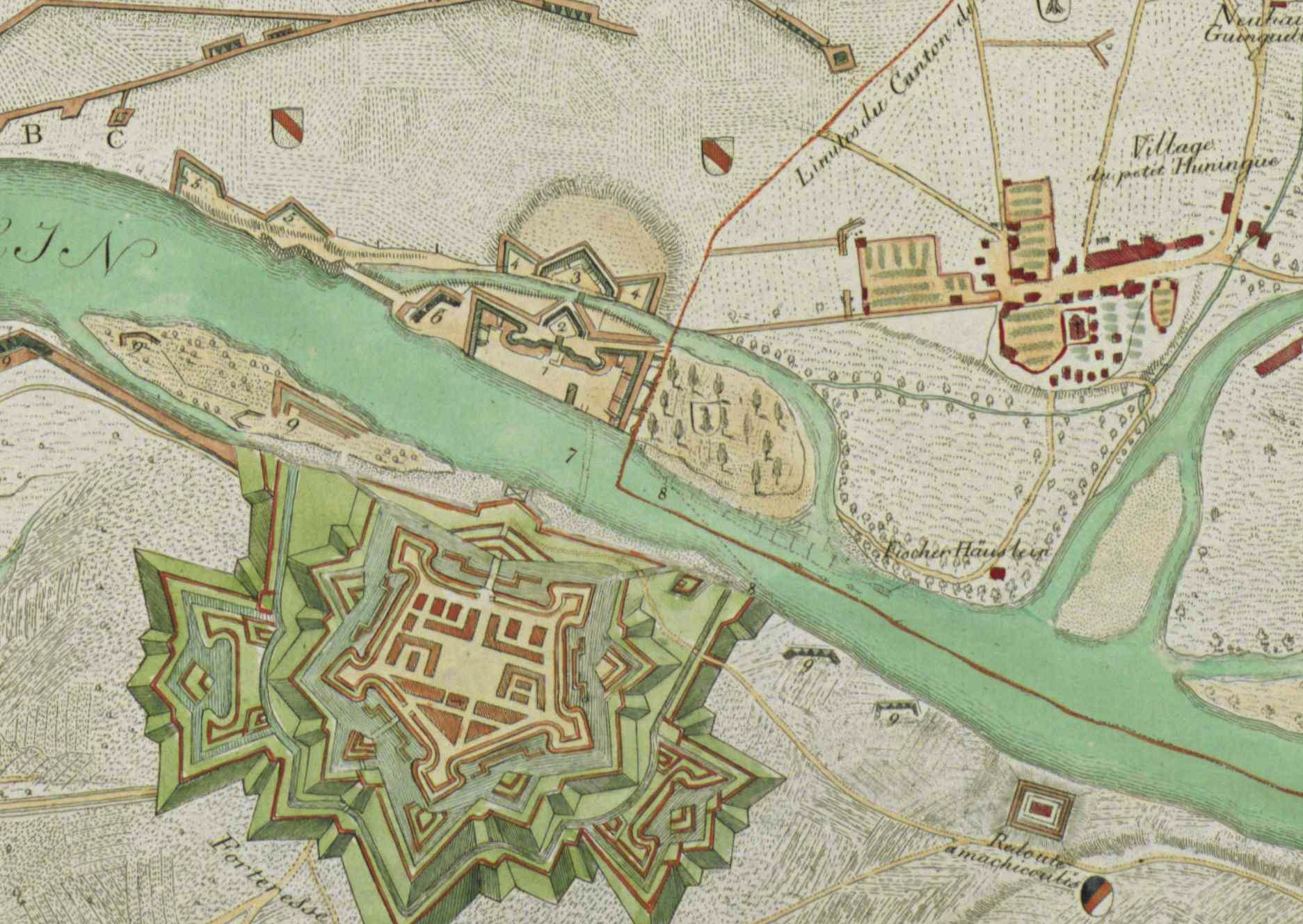 Ausschnitt aus dem Plan der Belagerung des Brückenkopfs der französischen Festung Hüningen 1796-1797 durch kaiserliche Truppen. Nicht dargestellt ist die Schiffsbrücke zwischen der Festung und dem Brückenkopf über den Rhein, die bei Beginn der Kampfhandlungen durch Artillerie zerstört wurde. Originaltitel: Plan des attaques et de la défense de la tête de pont d'Huningue depuis le 22 octobre 1796 jusqu'au 1er février 1797, jour de la capitulation; levé et dessiné par Ch. Pinot... Huningue (1796-1797) de Chr. Mechel